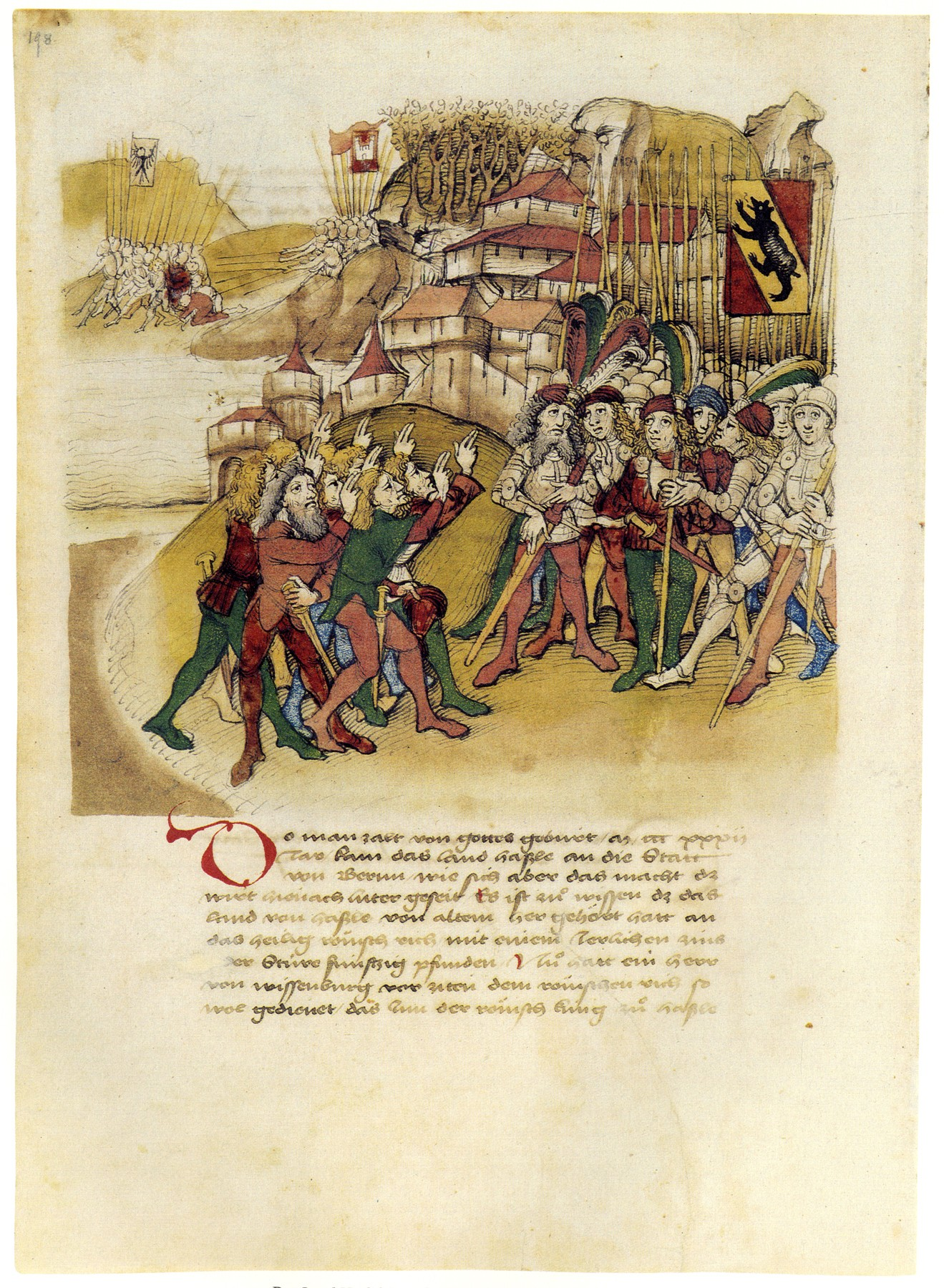 Die Schweiz im MIttelalter in Diebold Schillings Spiezer Chronik, Studienausgabe, Faksimile der Handschrift Mss. hist. helv. I. 16 der Burgerbibilothek Bern, hrsg. von Hans Haeberli und Christoph von Steiger, Luzern: Faksimile Verlag, 1991.